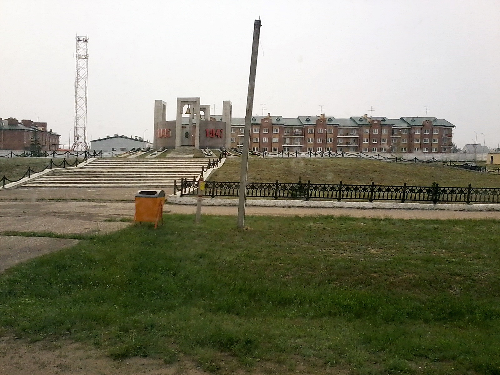 Мемориал Победы в селе Кулунда Алтайского края.